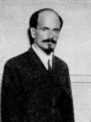 Московский городской глава, 1917